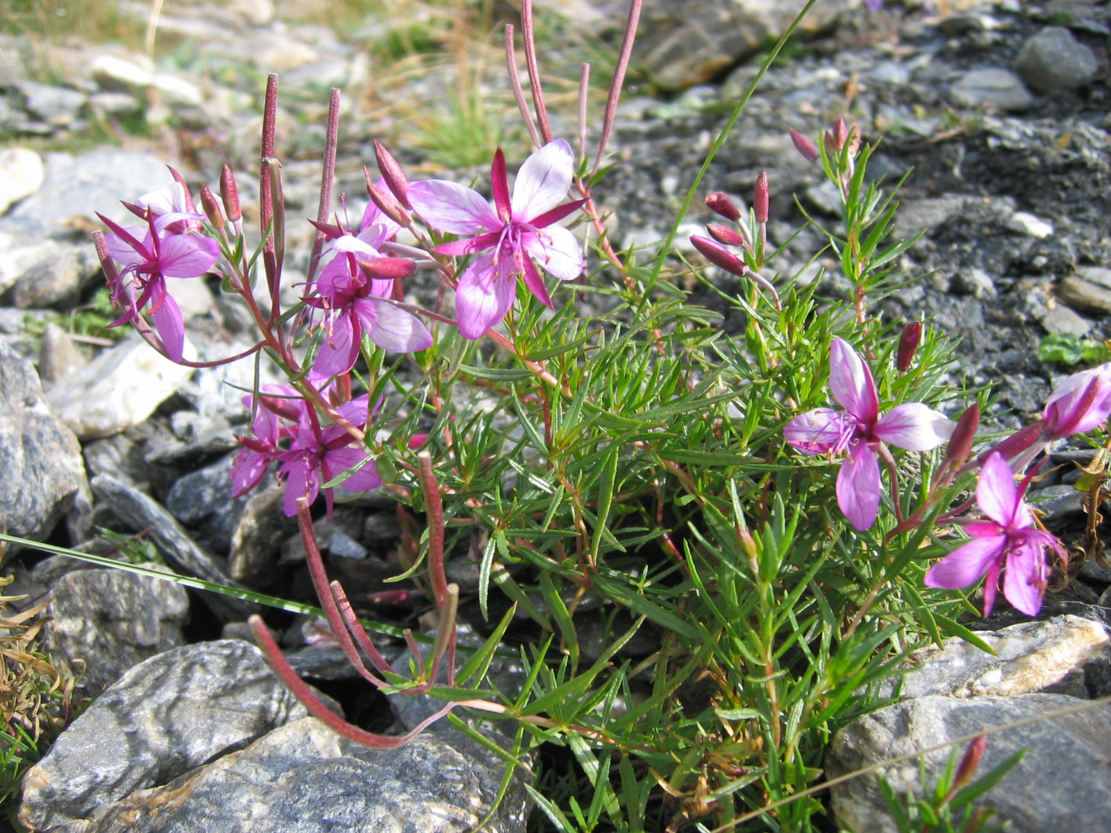 Epilobium fleischeri : Tour de la tête des Toillies - (Piémont, Italie)